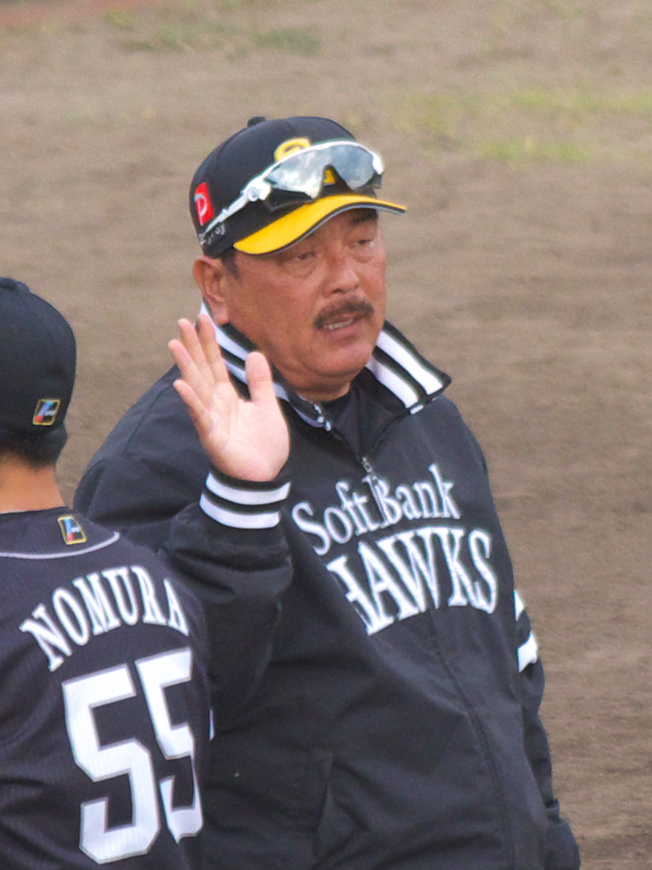 福岡ソフトバンクホークス3軍監督藤本博史